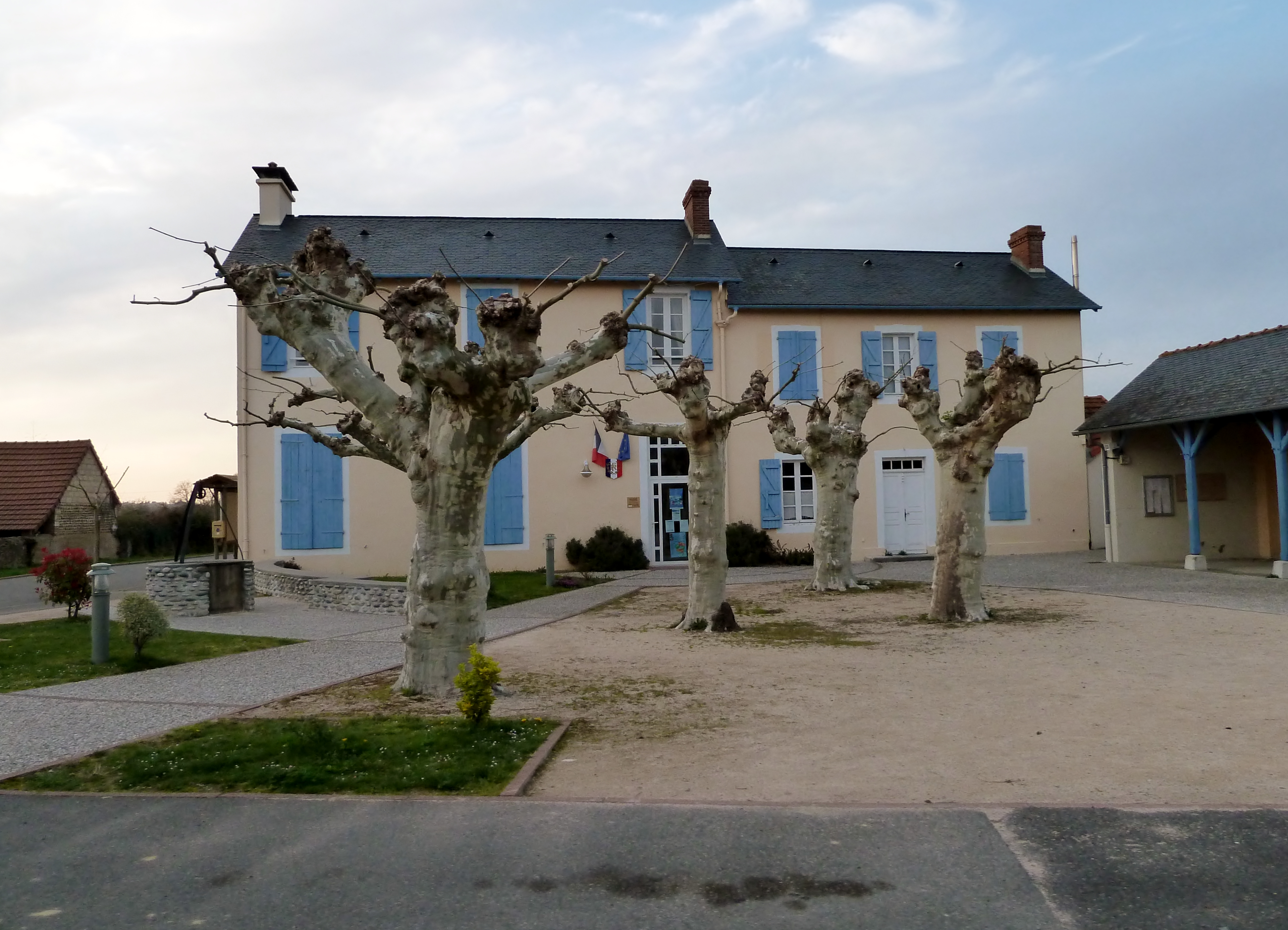 Mairie d'Argelos (Pyrénées-Atlantiques)